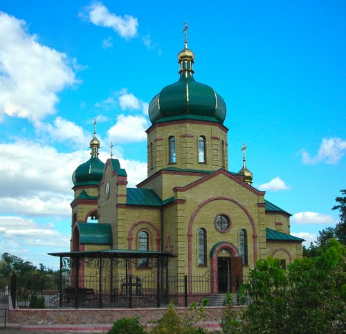 Церковь в селе Богодуховка на Черкасщине.